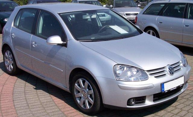 Golf V silbermetallic, eigenes Bild, GFDL